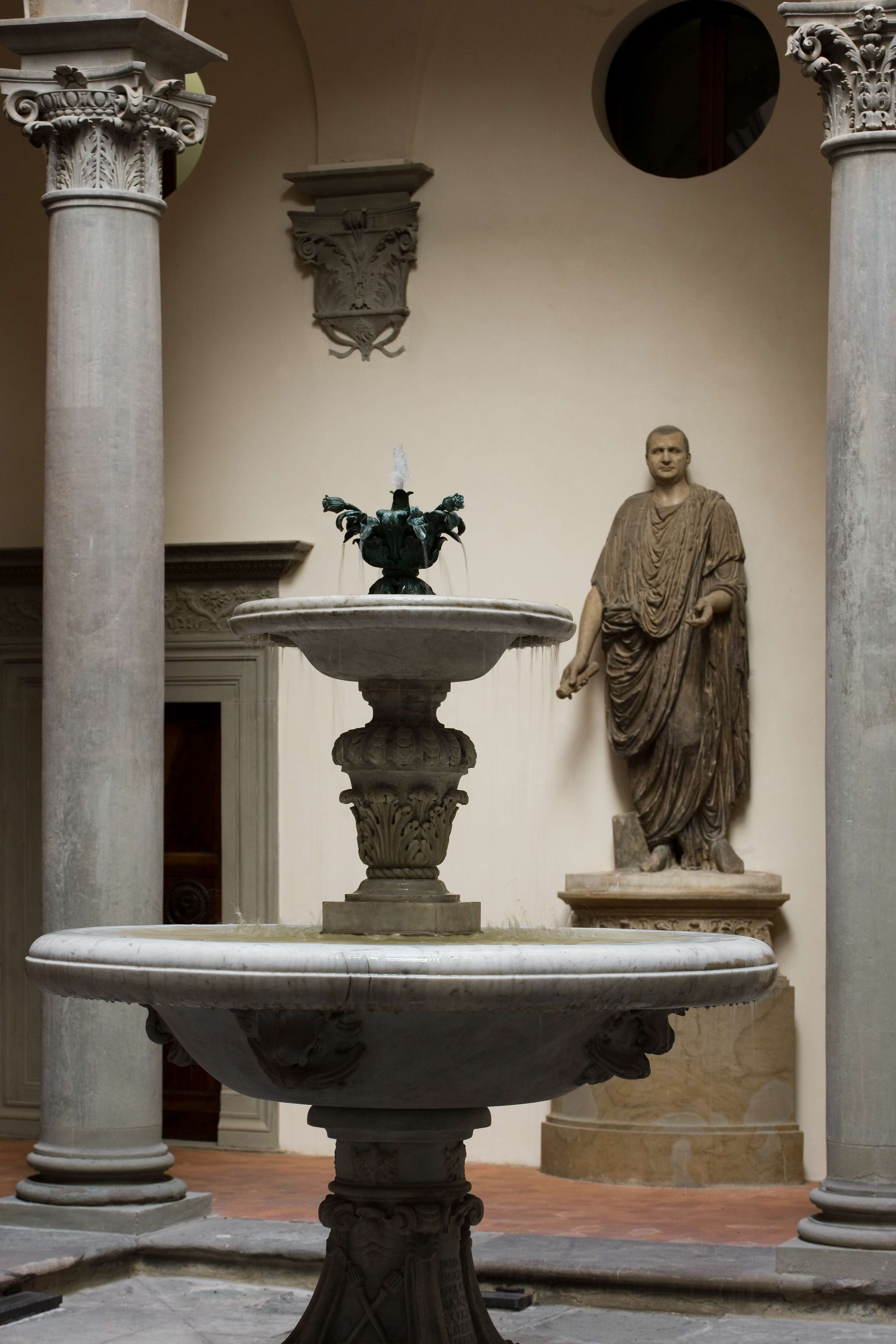 Fontana del cortile di Palazzo Gondi